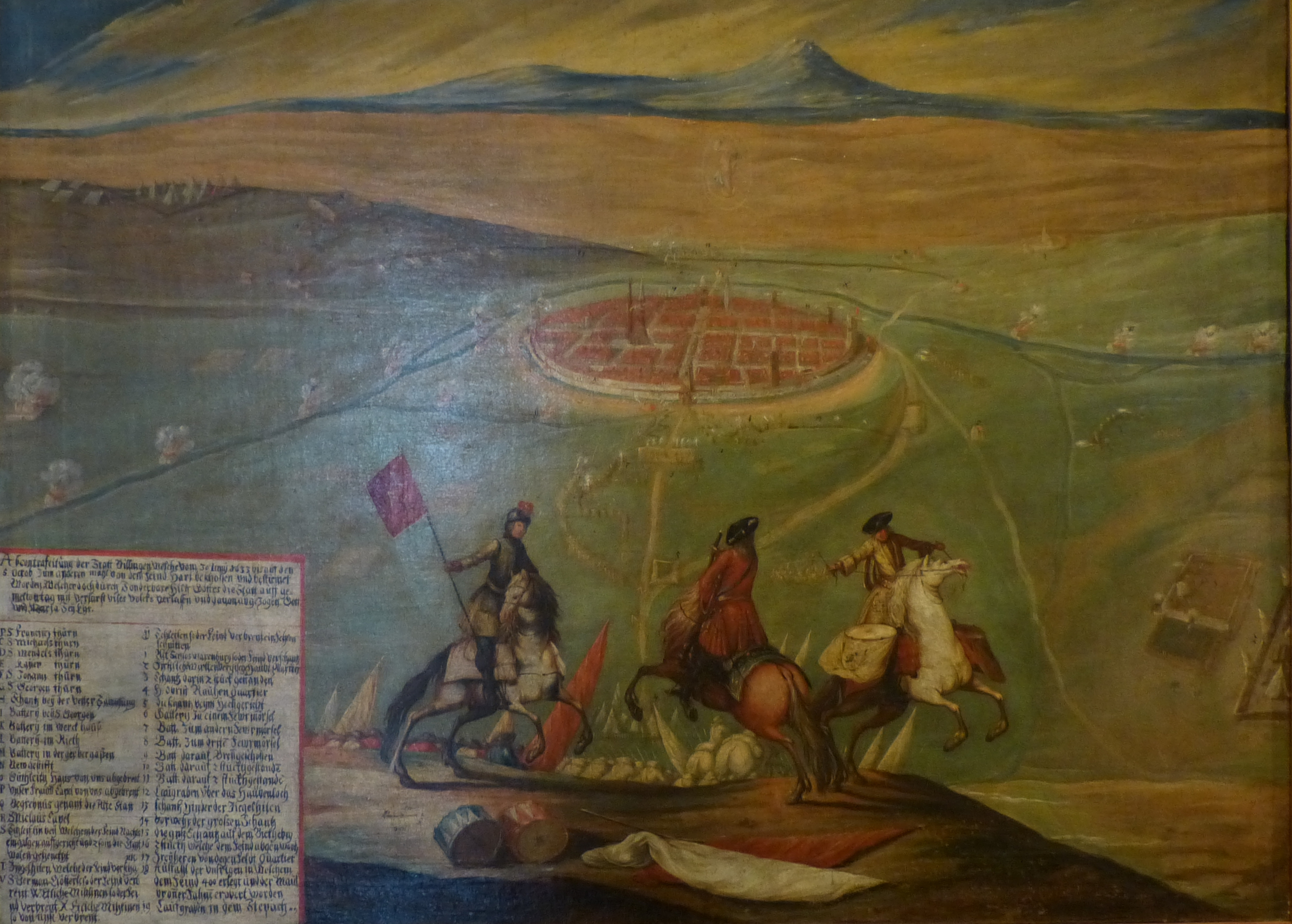 Franziskanermuseum Villingen, Baden-Württemberg